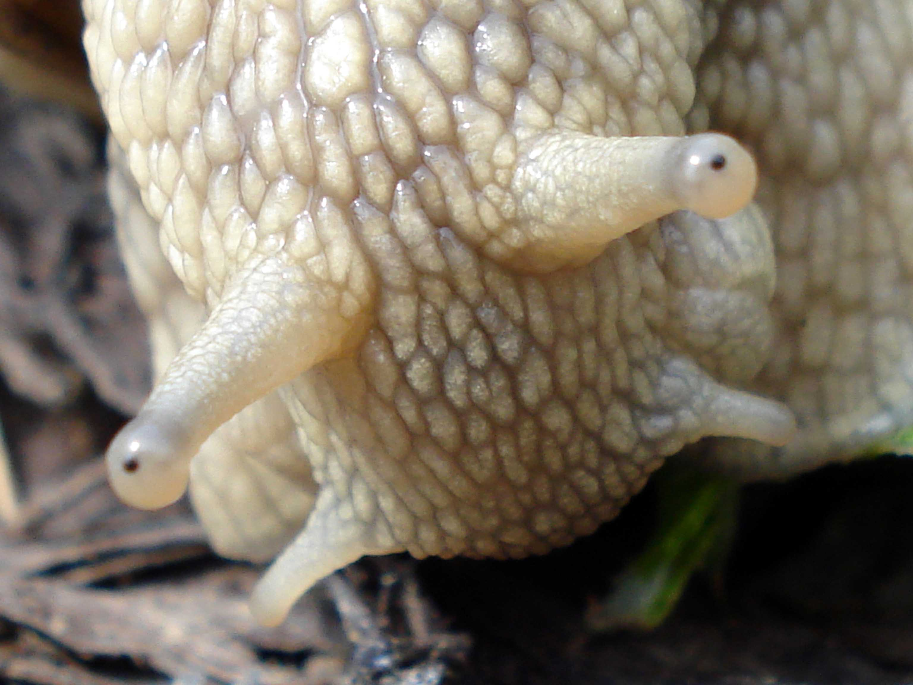 Helix pomatia (Unterfranken, Germany). An den beiden langen Fühlern sind die Augen als dunkle Punkte zu erkennen.